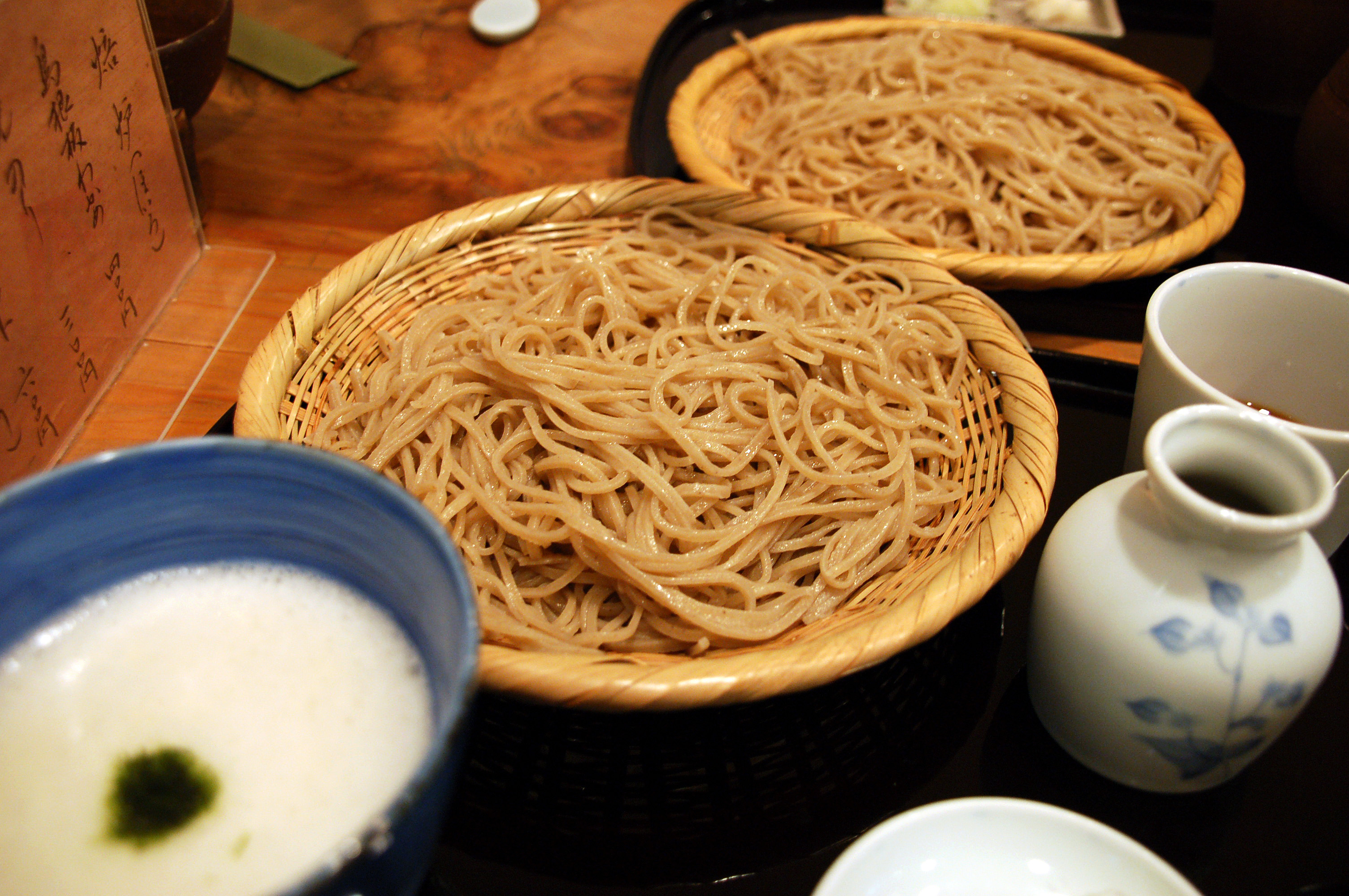 2006.05.20 12:19, Tokyo Nezu (根津・鷹匠) 谷中Ｍ類栖: 鷹匠のバナナの葉